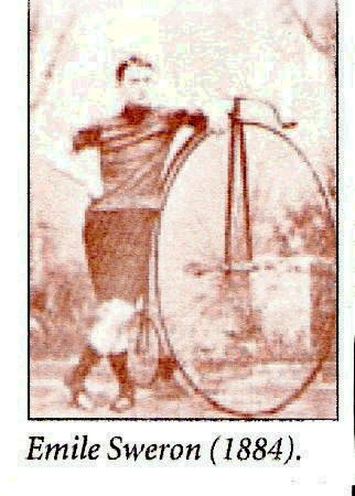 Emil Sweron Kampioen Hoge-bi